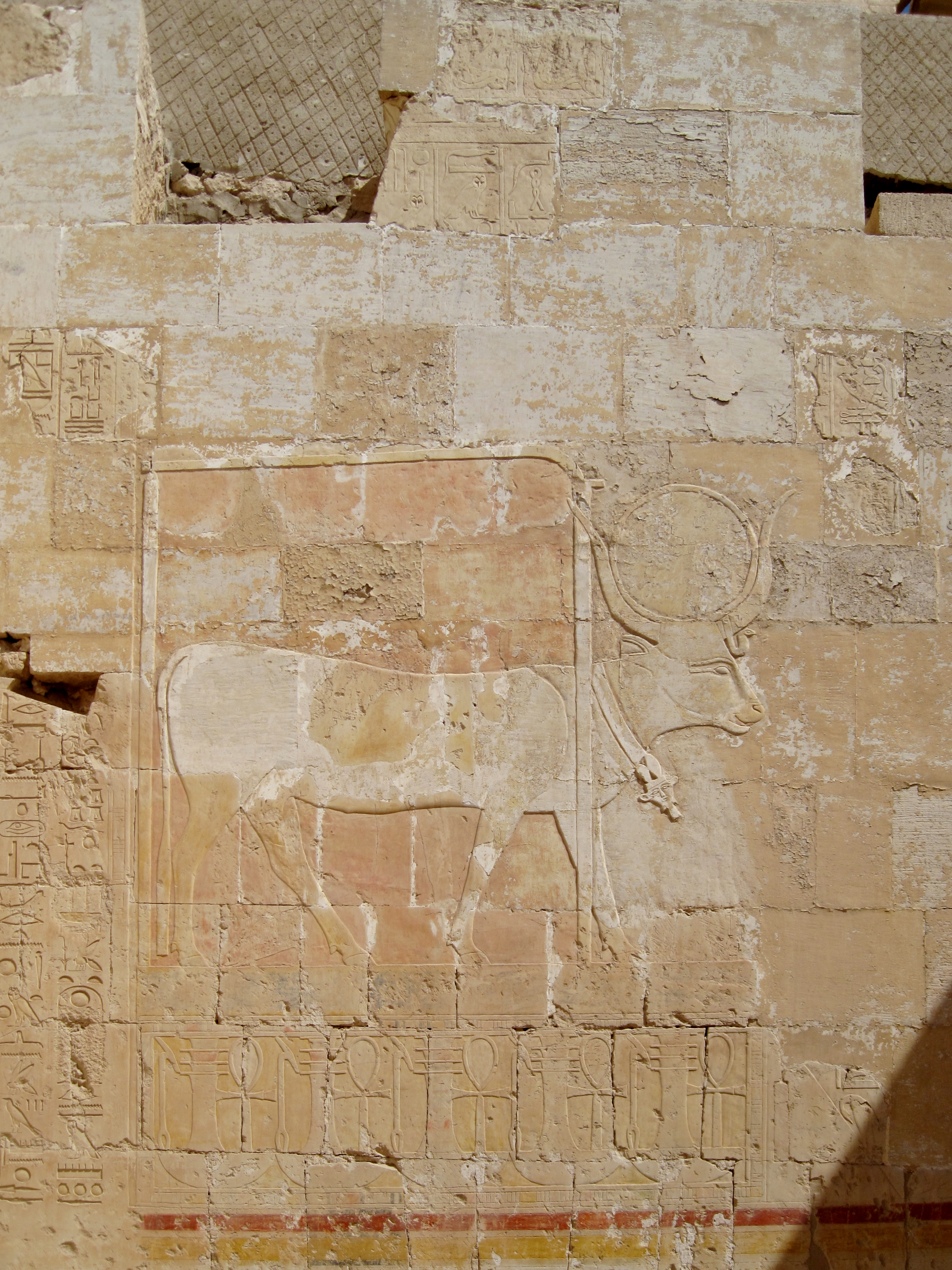 Relief in der Hathorkapelle im Totentempel der Hatschepsut in Deir el-Bahari nordwestlich von Luxor, Ägypten